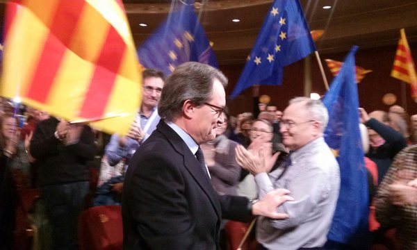 Artur Mas en un acte de Democràcia i Llibertat a Sabadell.